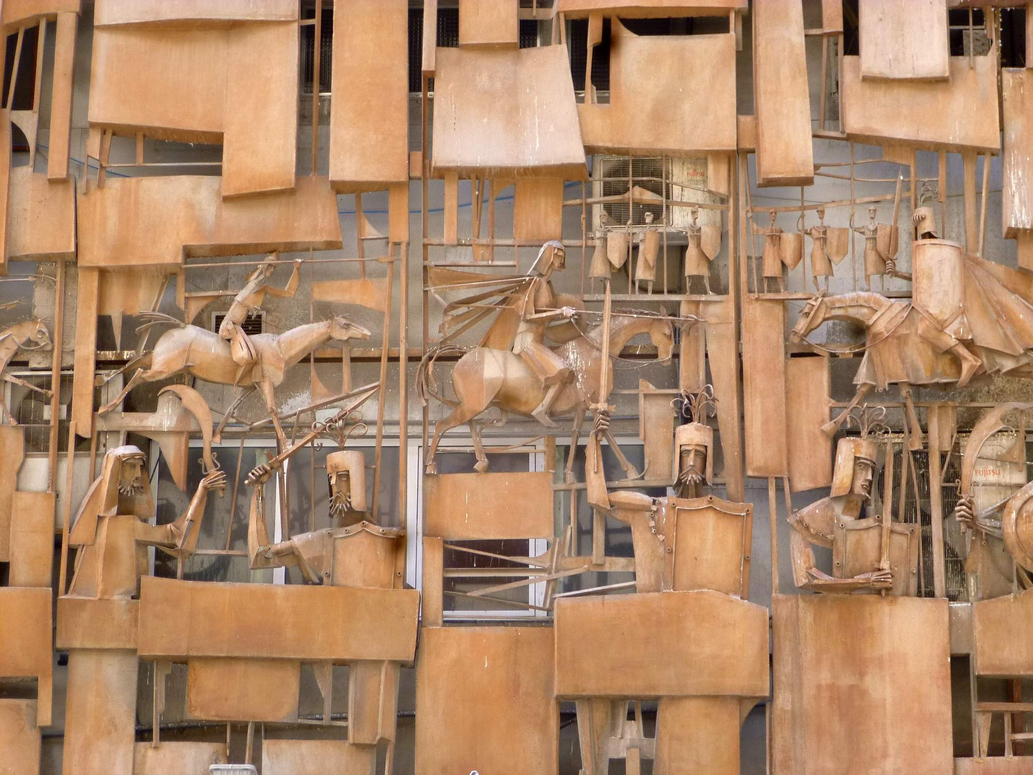 Alcoy - Hotel Reconquista